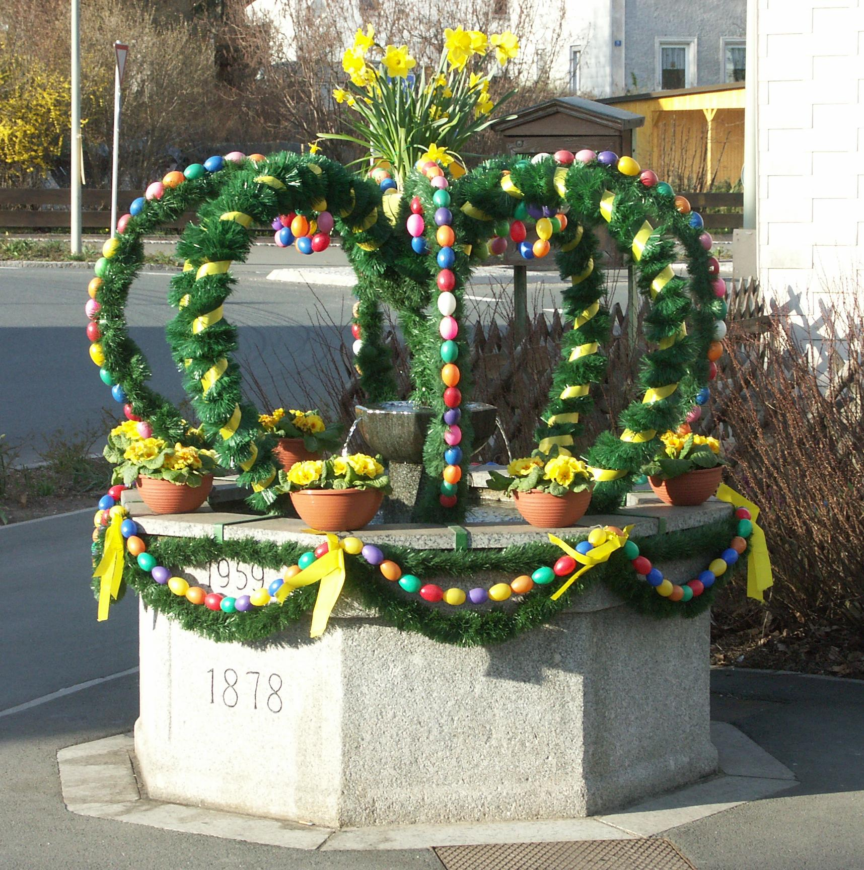 Fontaine de Pâques à Marktleuthen dans le Fichtelgebirge Photo by Jean-Patrick Donzey